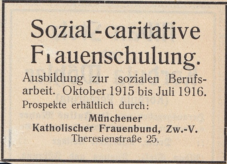 Werbeanzeige für Sozial-caritative Frauenschulung